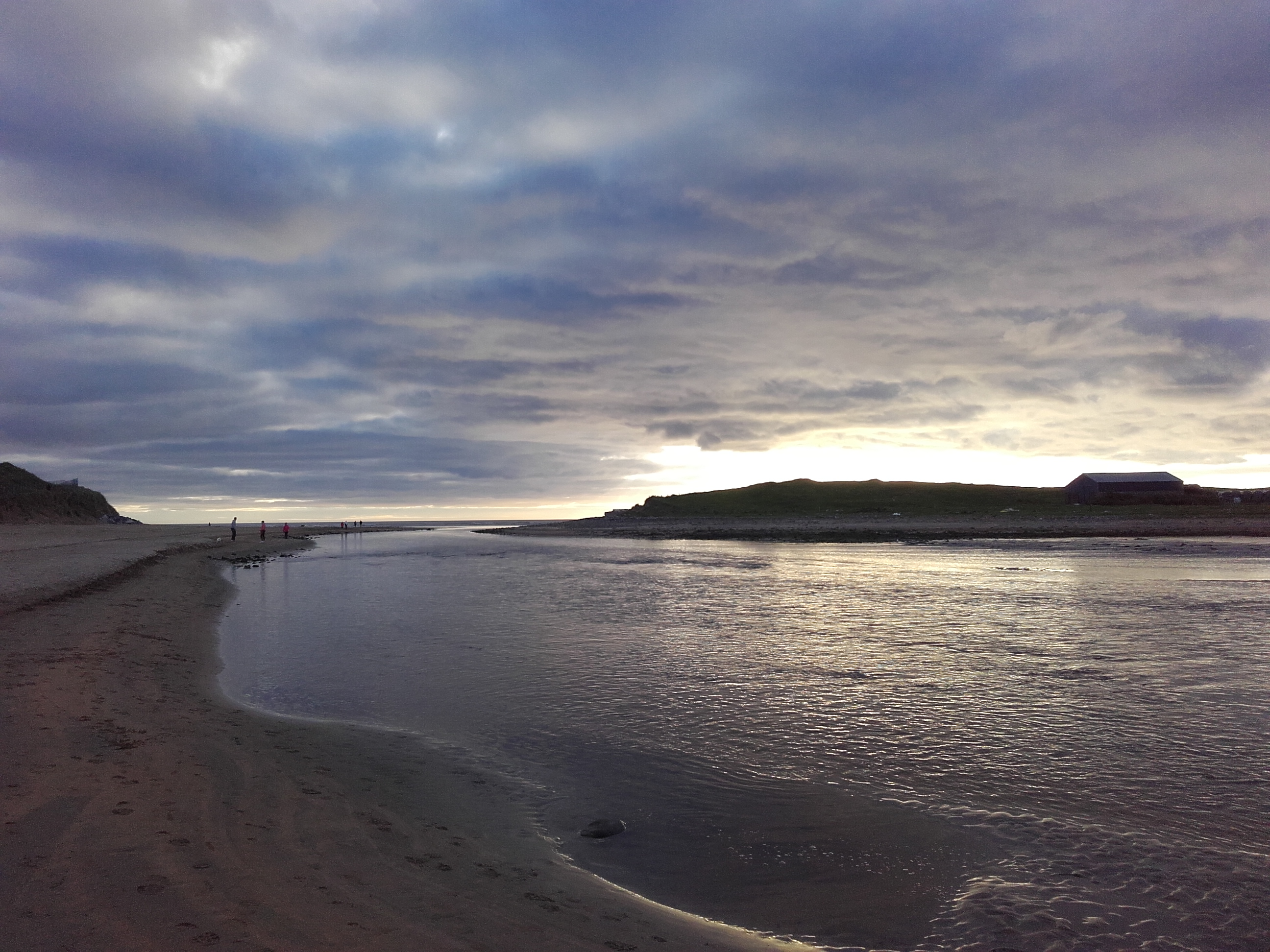 Desembocadura do río Inagh no Atlántico (Lahinch).